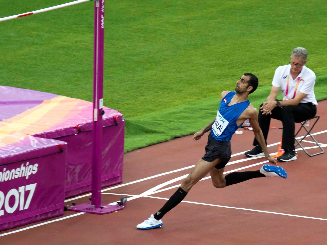 d9_2 finale hoog ghazal